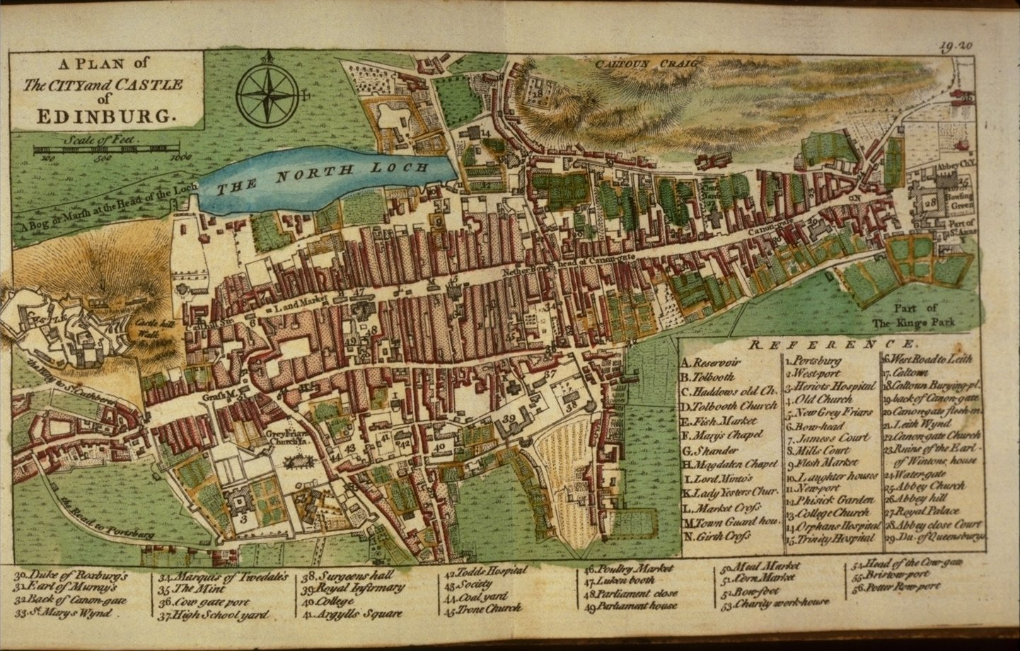 Handkolorierter Kupferstich / Plan der schottischen Stadt Edinburgh